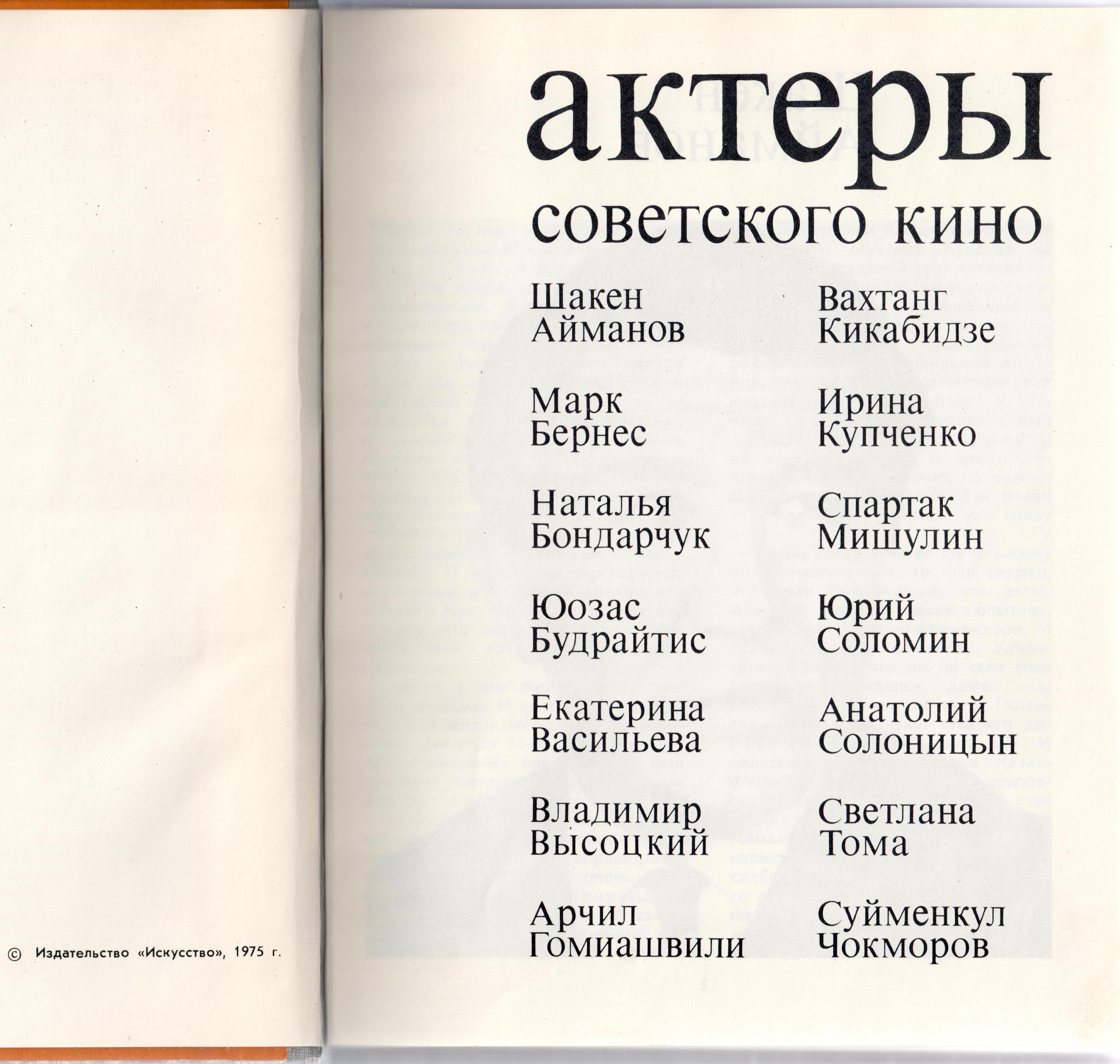 Разворот издания "Актёры советского кино", 1975 год, выпуск 11